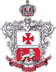 Frimureri: Den Norske Frimurerordens våpen. Gitt av Kong Oscar II av Sverige og Norge, den 24. juni 1891.